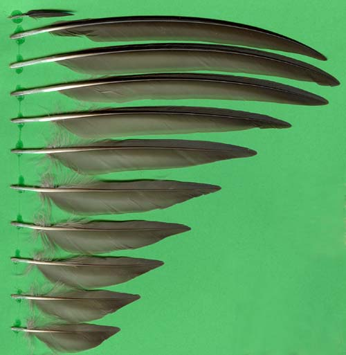 Handschwingen eines Mauerseglers (Apus apus)